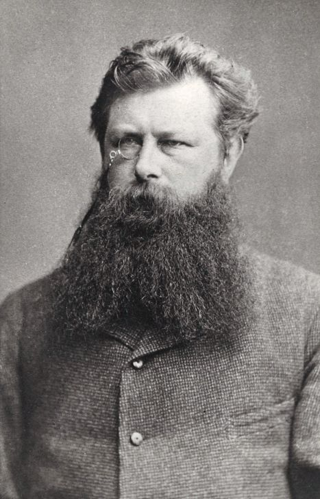 Michael Dedekam